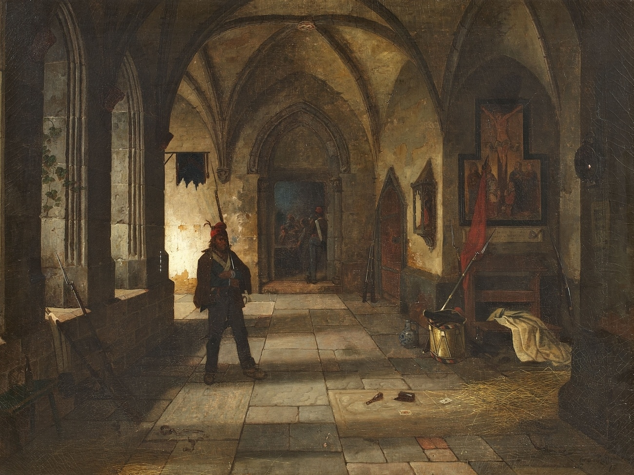 Soldaten im Kreuzgang eines Klosters. Signiert und datiert unten rechts: Ludw. v. Roeßler 75. Öl auf Leinwand (doubliert). 85 x 112 cm.